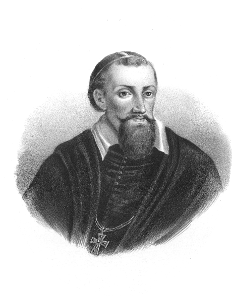 Andrzej Krzycki primate of Poland